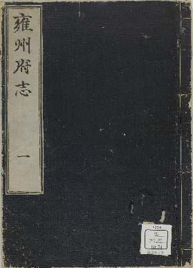 黒川道祐による山城国の地誌『雍州府志』